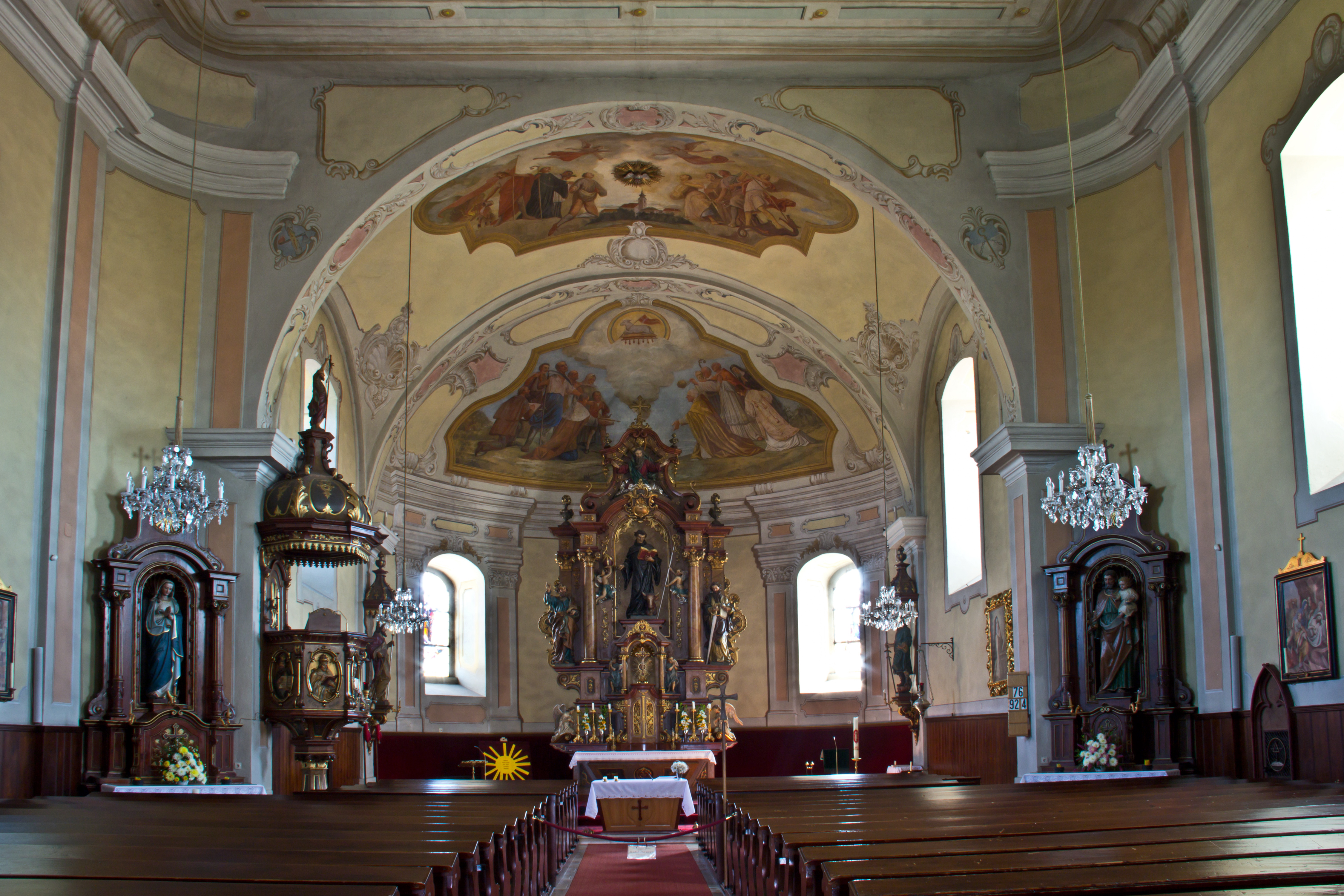 Kath Pfarrkirche St. Leonhard am Hornerwalde